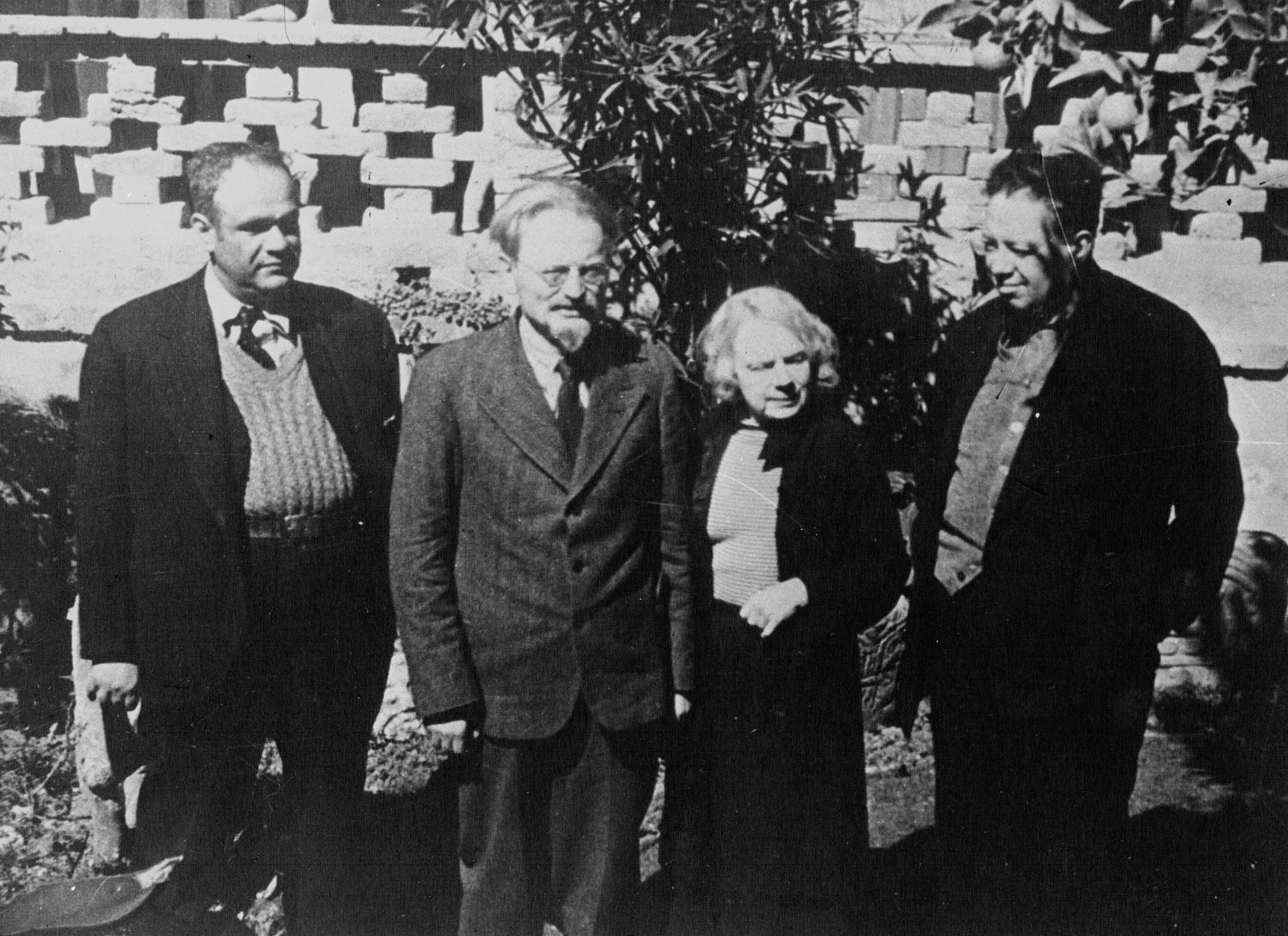 Trotski y familia en Méjico en 1937. From left to right: a friend, Trotsky, his wife Natalia Sedova and Diego Rivera.